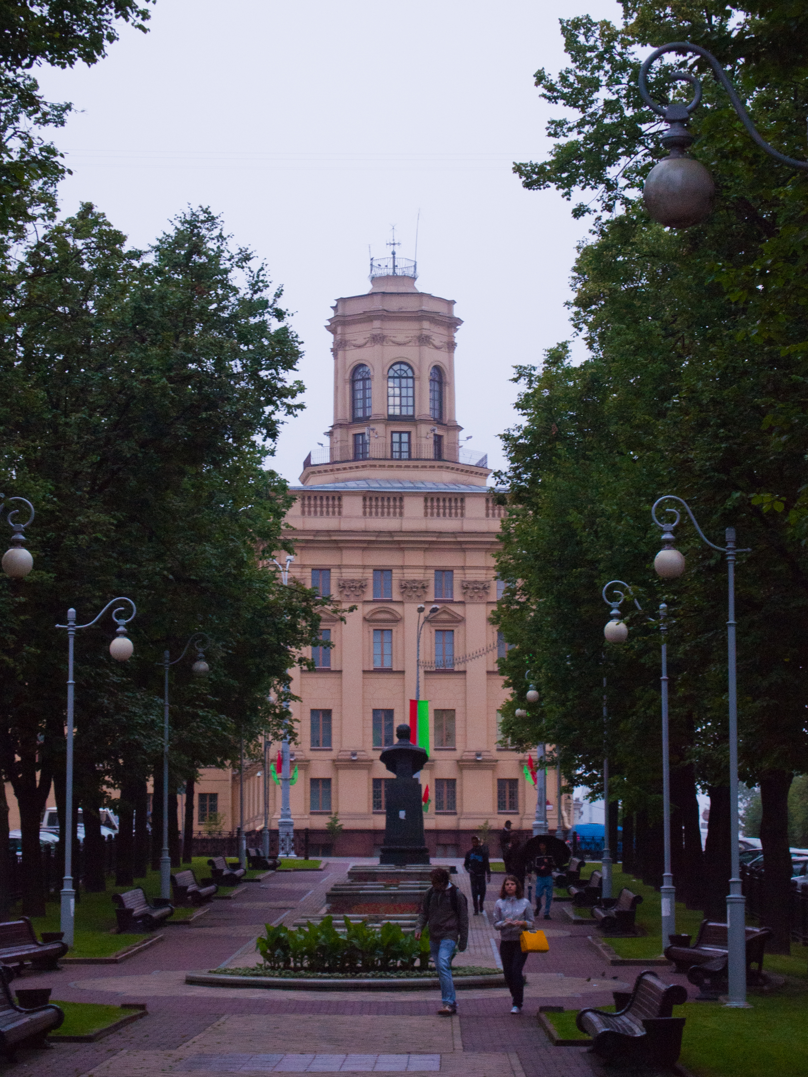 Minsk - Park an Komsomolskaja